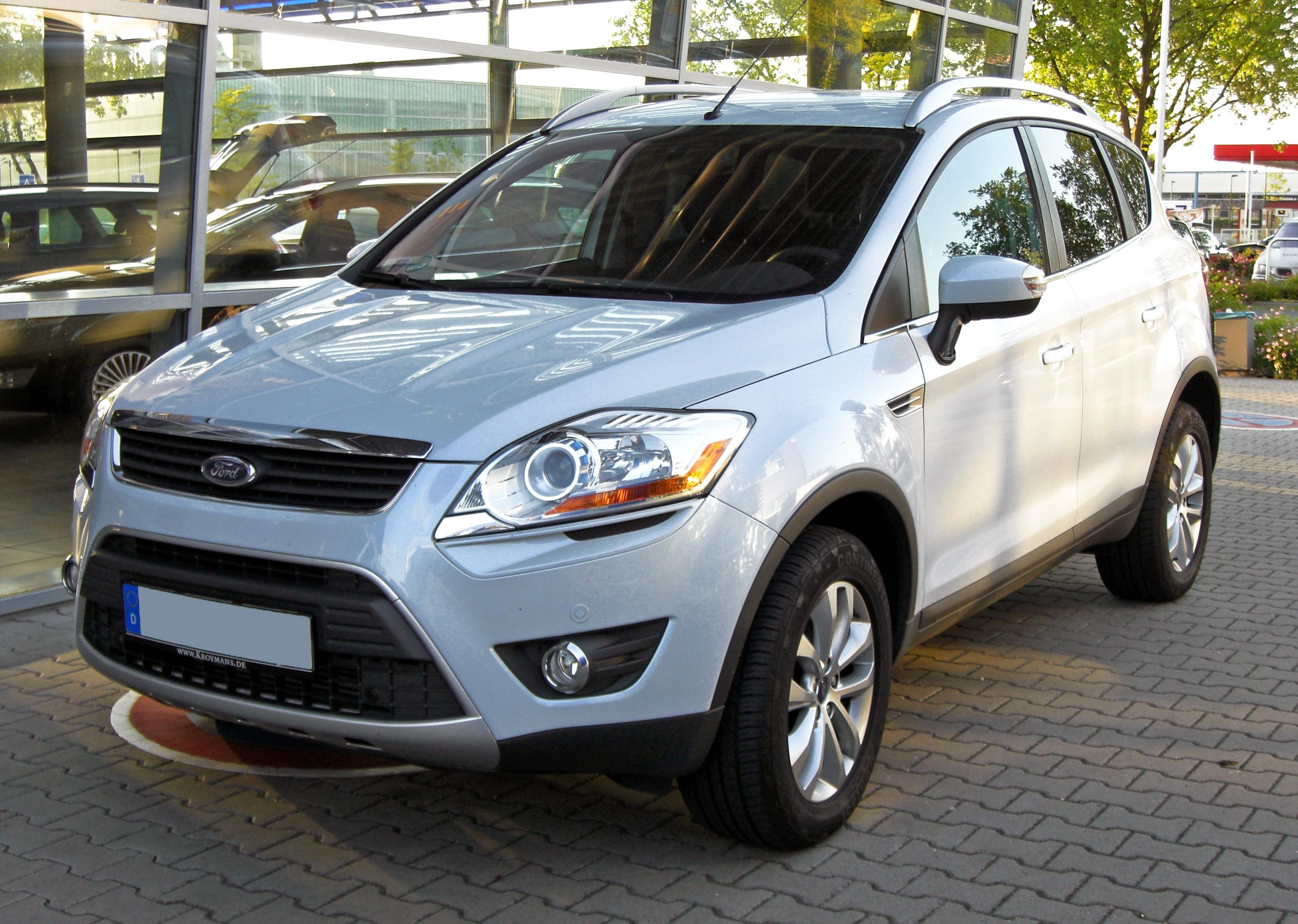 Ford Kuga